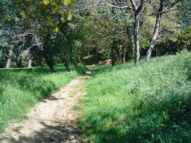 Bois de Courbebaisse ville du Pradet